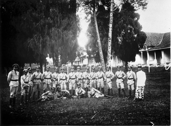 Foto. Groepsportret van het corps van de veldpolitie Poedjon te Malang.